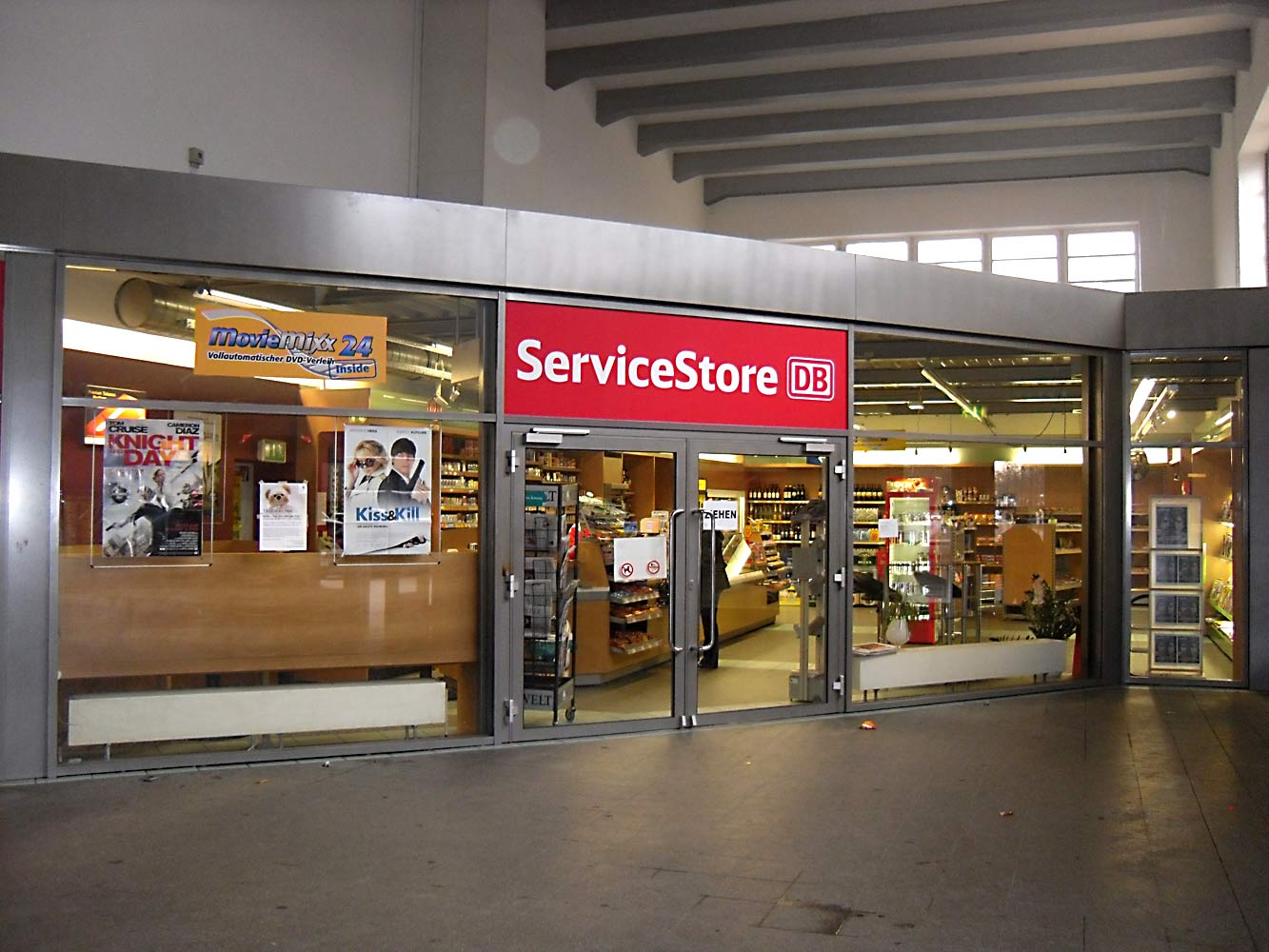 Station Benrath (Düsseldorf)